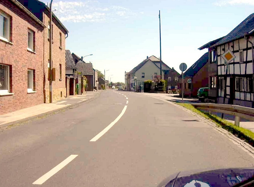 Niederelvenich